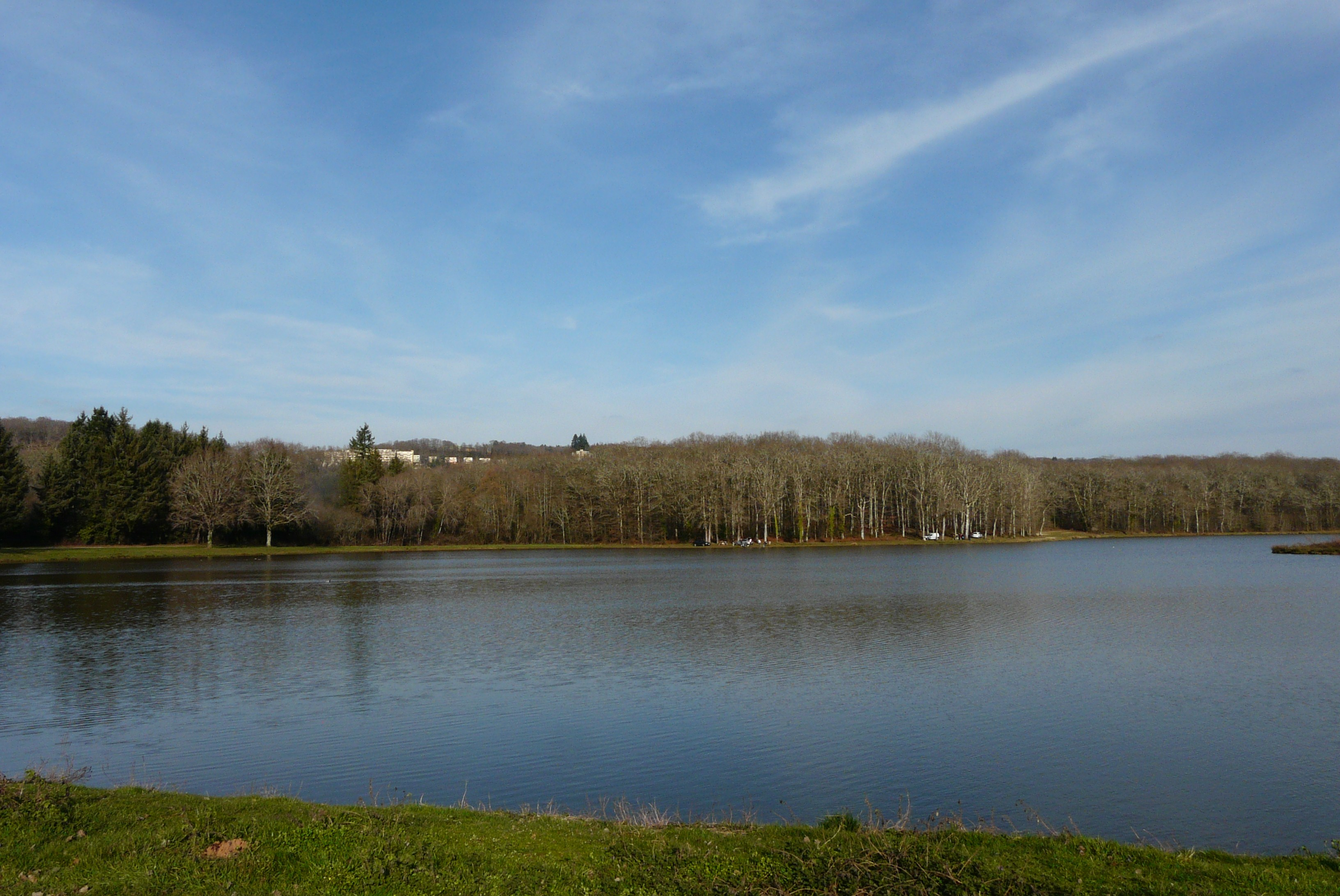 L'étang de Born à Salagnac, Dordogne, France.